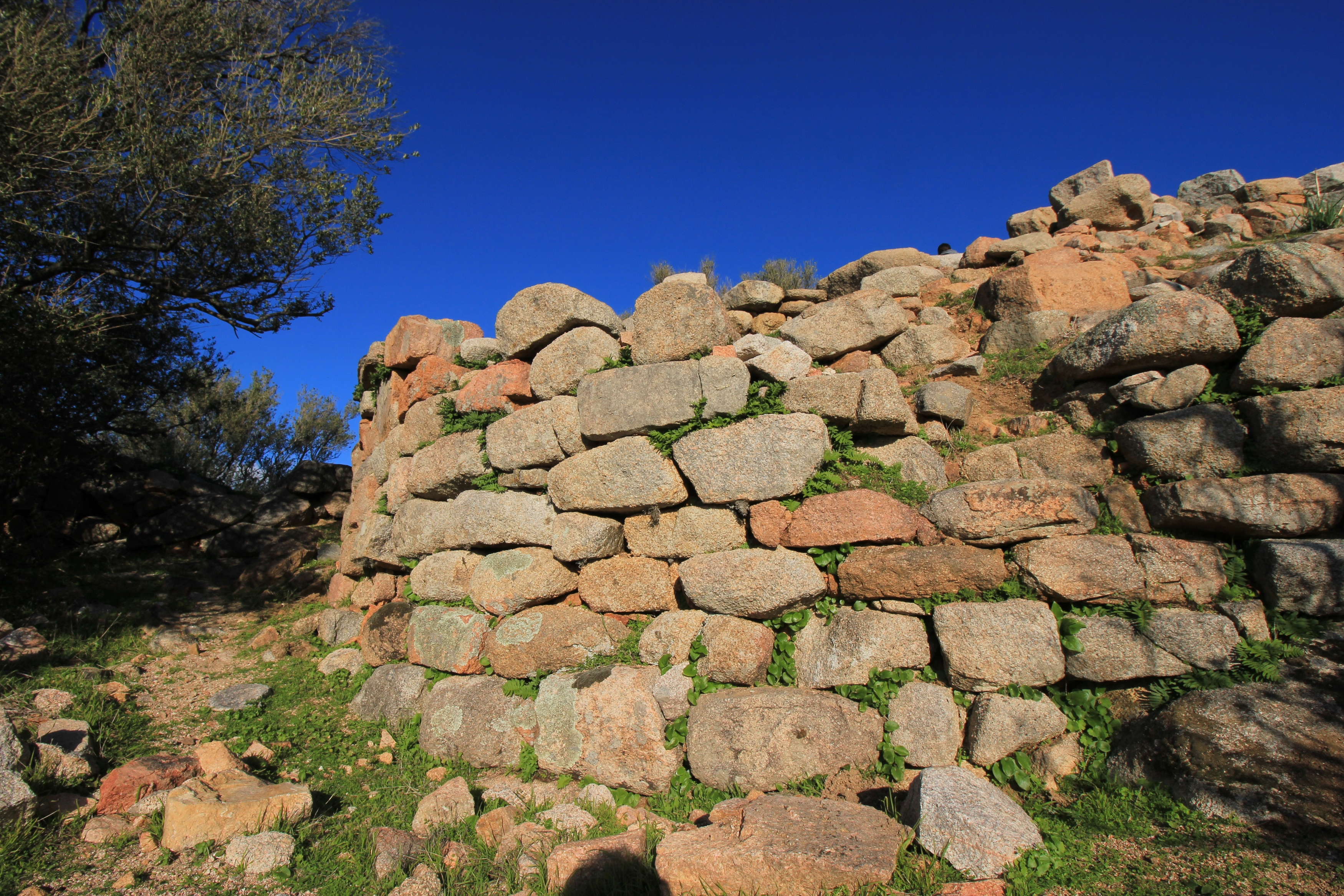 Der prähistorische Torre von Ceccia auf Korsika